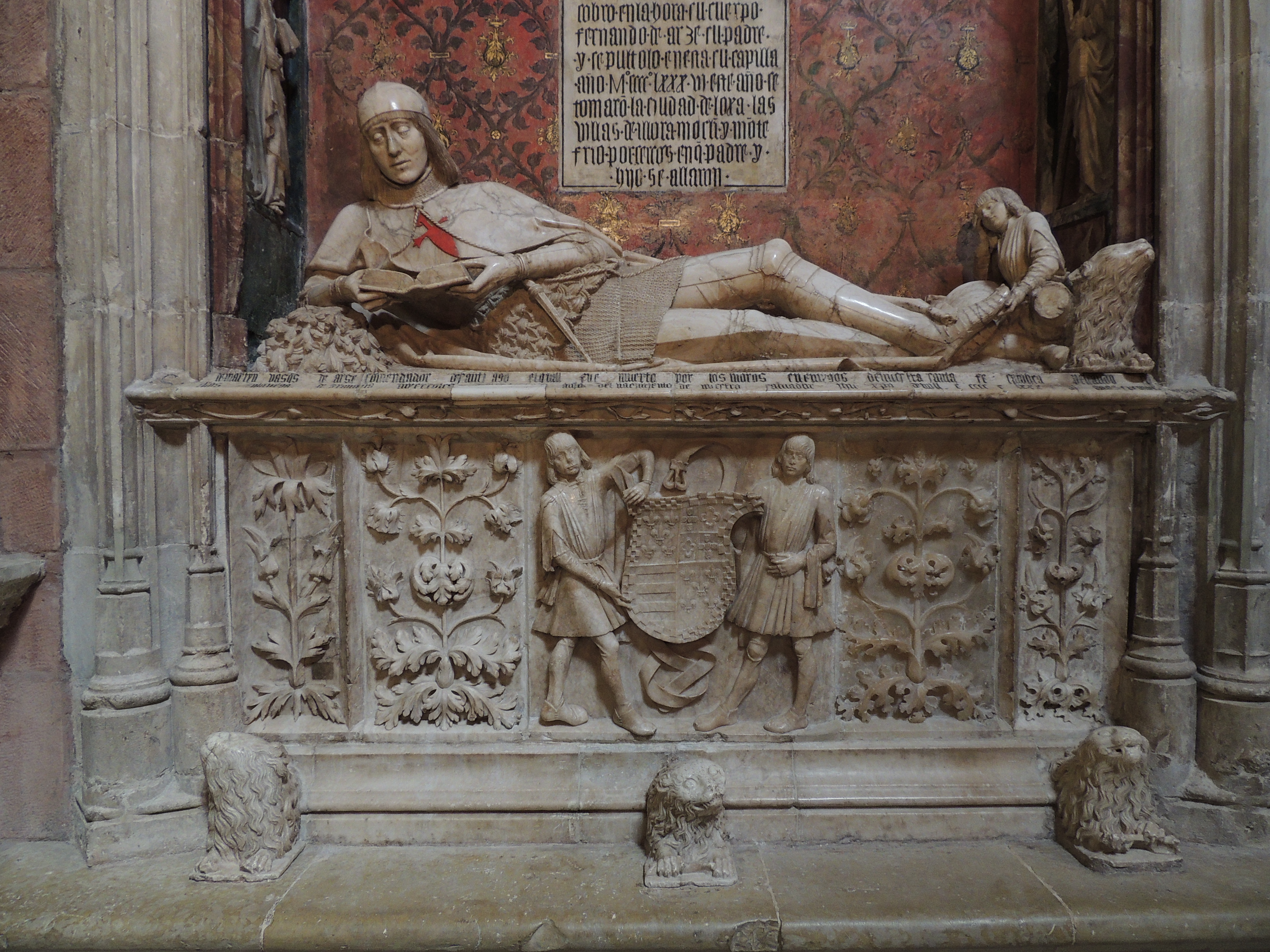 Sepulcro de Martín Vázquez de Arce